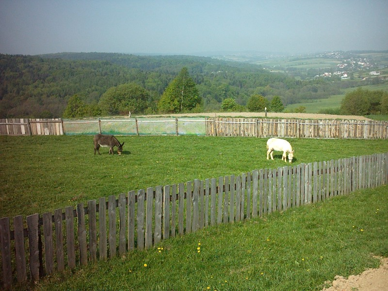 przedgorze_bochenskie